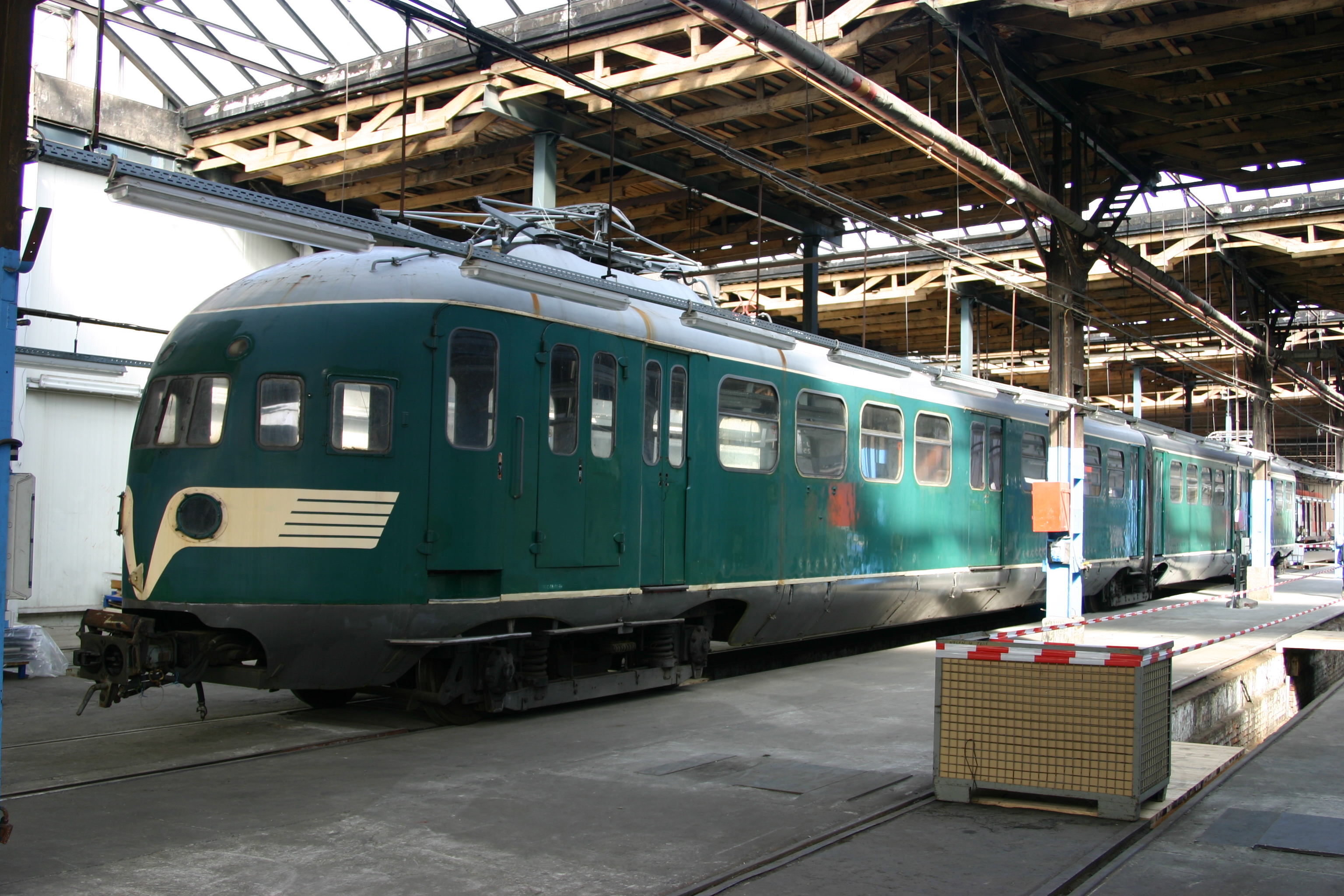 Elektrischer Triebwagen Reihe Mat`36 Nummer 252 der NS im SFW Delitzsch 30.08.08